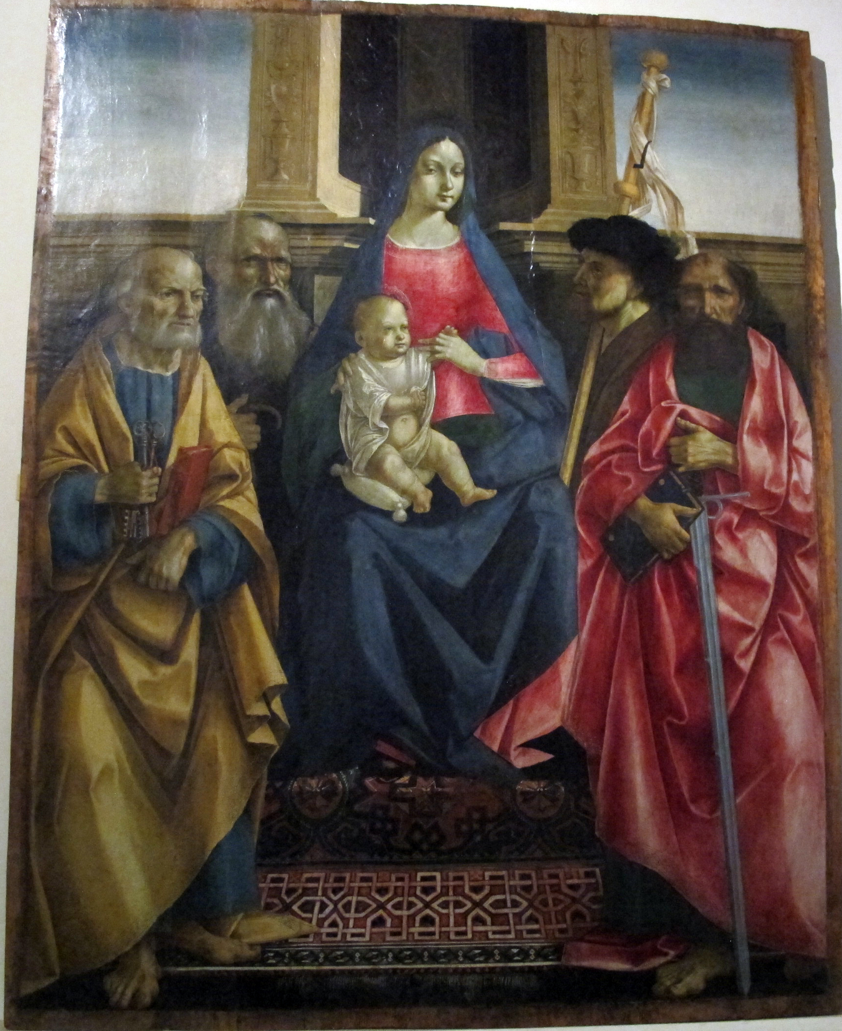 Museo nazionale di Villa Guinigi - MIBAC This is a photo of a monument which is part of cultural heritage of Italy.